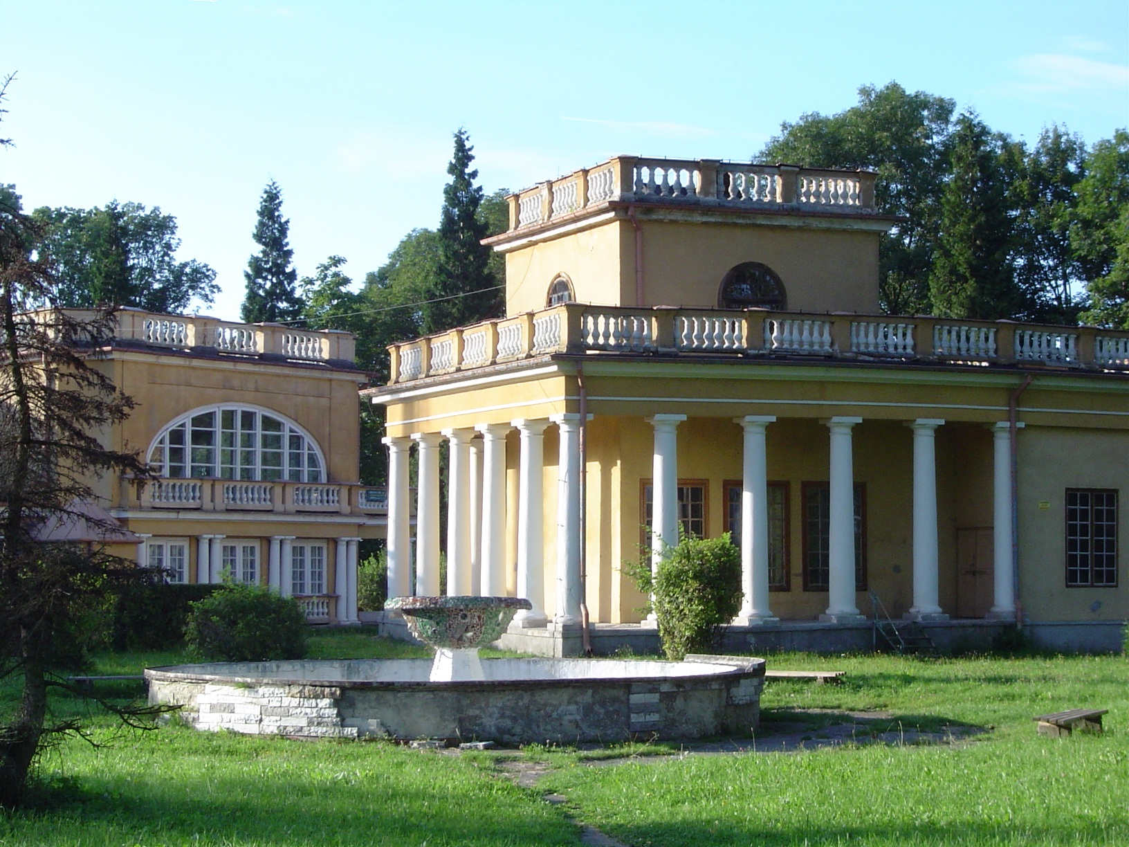 Łazienki w parku zdrojowym w Solcu Zdrój